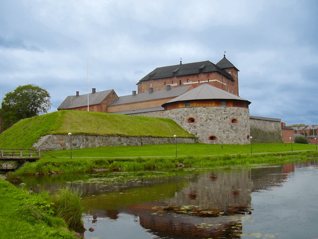 Hämeen linna in Hämeenlinna, Finland